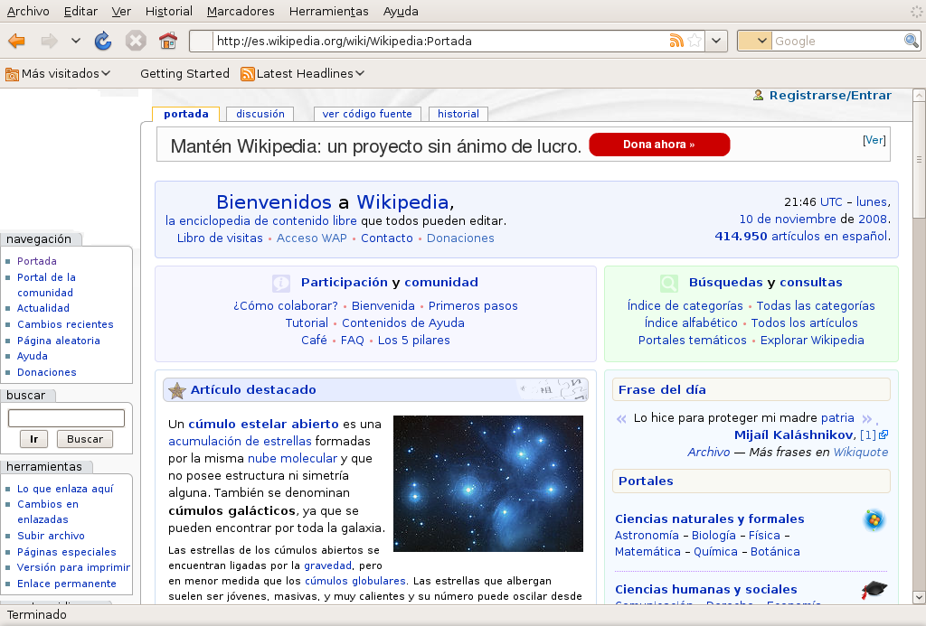 Una captura de pantalla de Firefox ejecutándose en Ubuntu mostrado la portada de la Wikipedia en español